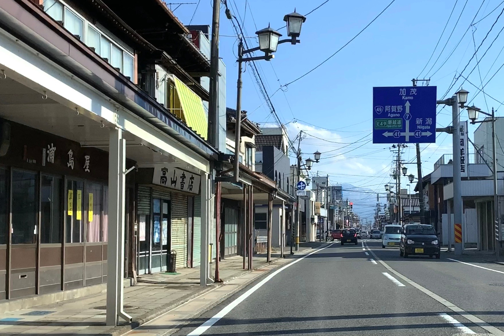 新潟県道7号新津村松線 五泉本町（2020年4月）